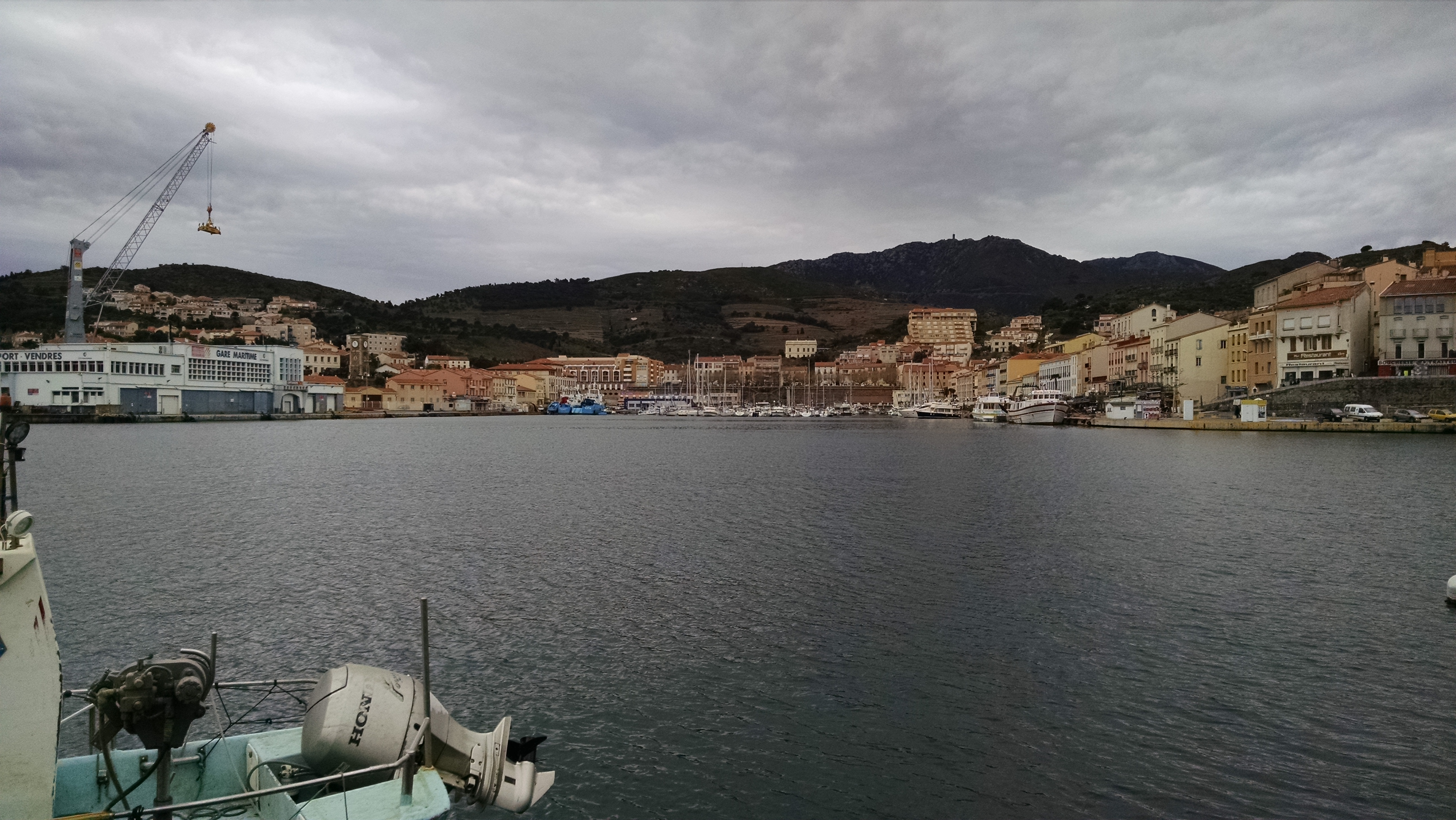 Vue d'ensemble du port (Port-Vendres)